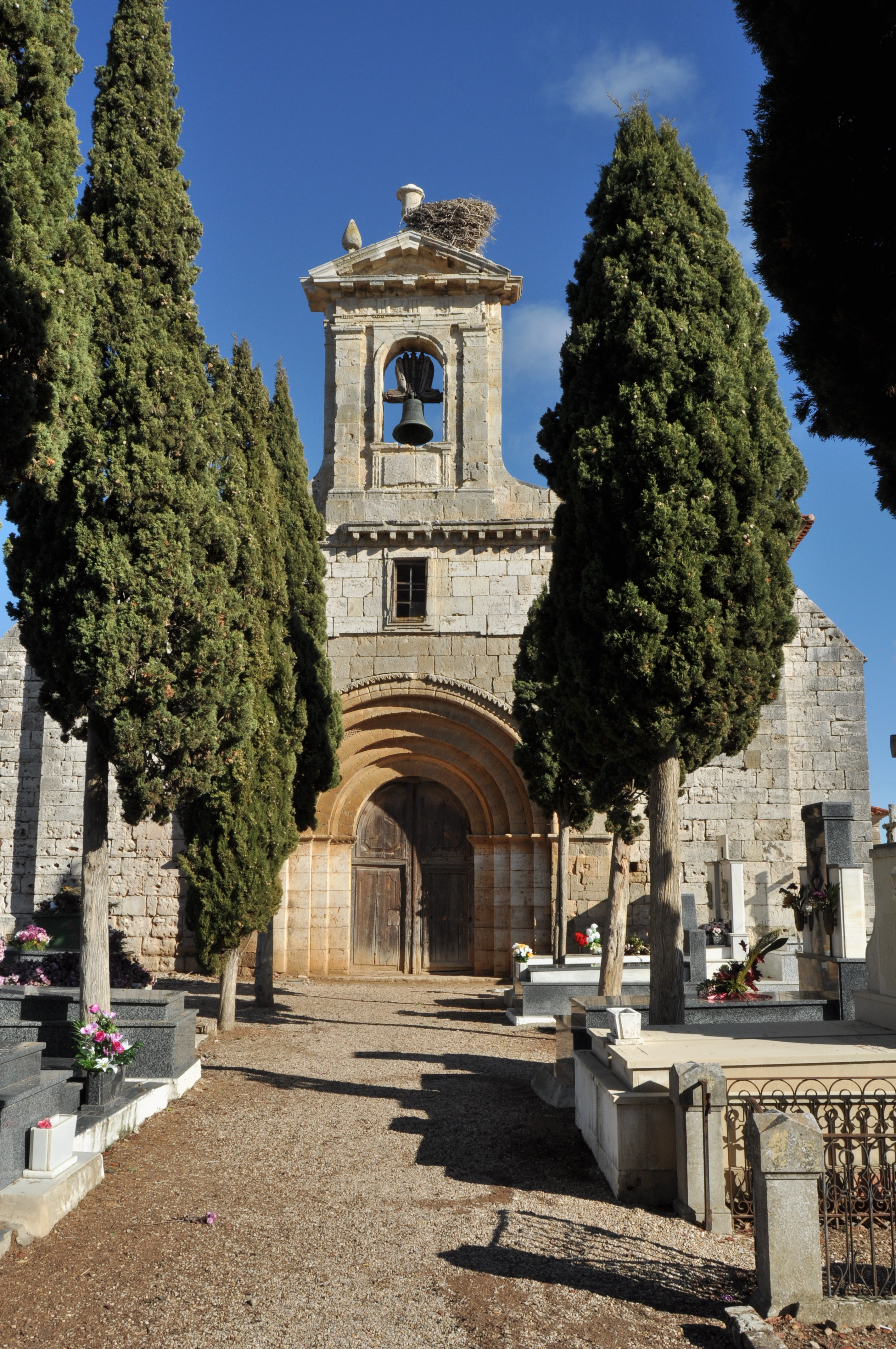 Torquemada - 029